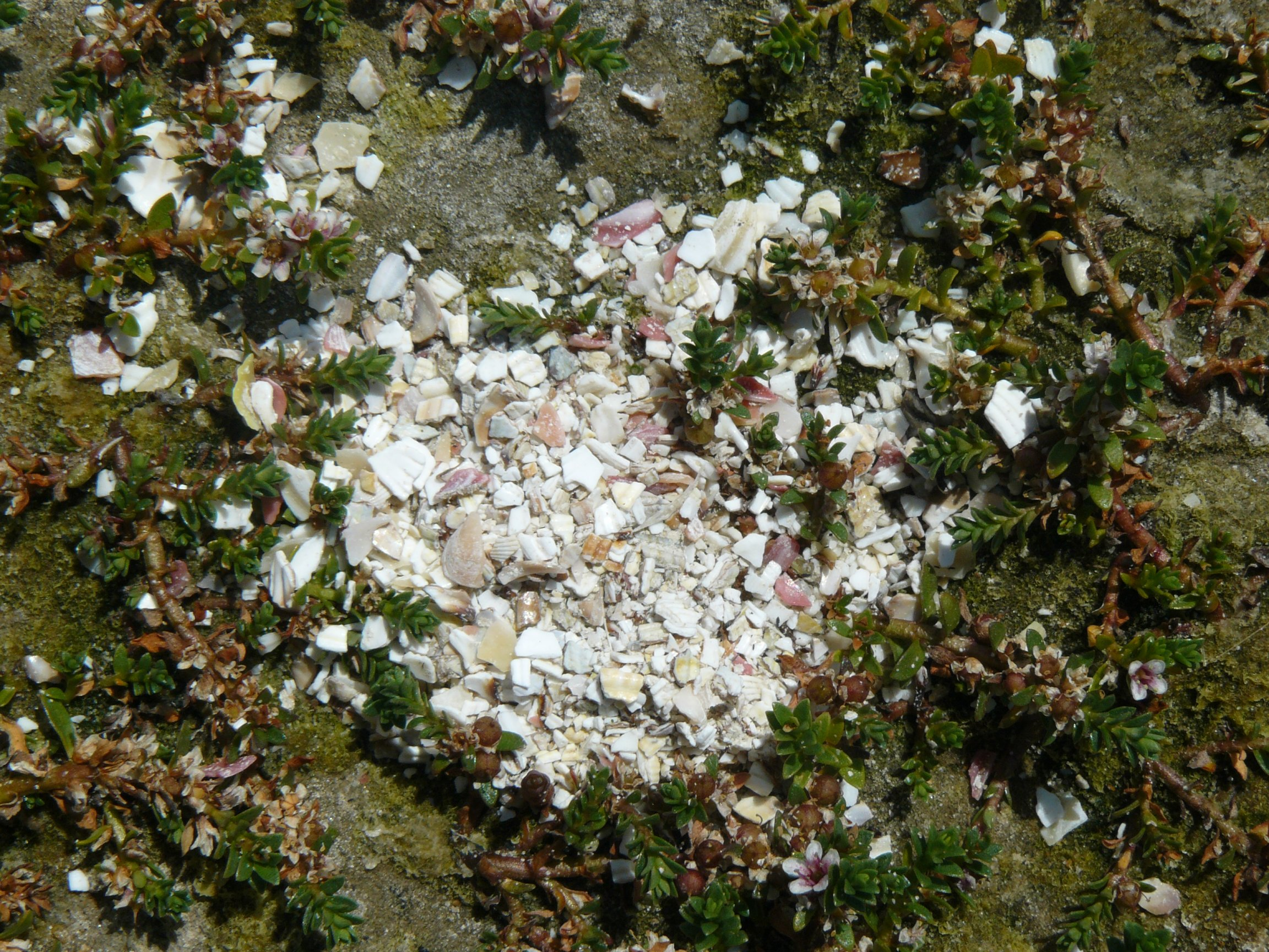 Door meeuwen gegeten en uitgebraakte resten van schelpen. Aangetroffen op de strandvlakte van Schiermonnikoog. Schelpen grotendeels onherkenbaar. Te zien zijn fragmenten van Cerastoderma edule, Mytilus edulis en Scrobicularia plana. Grootste doorsnede van het plakkaat is ongeveer 10 cm.